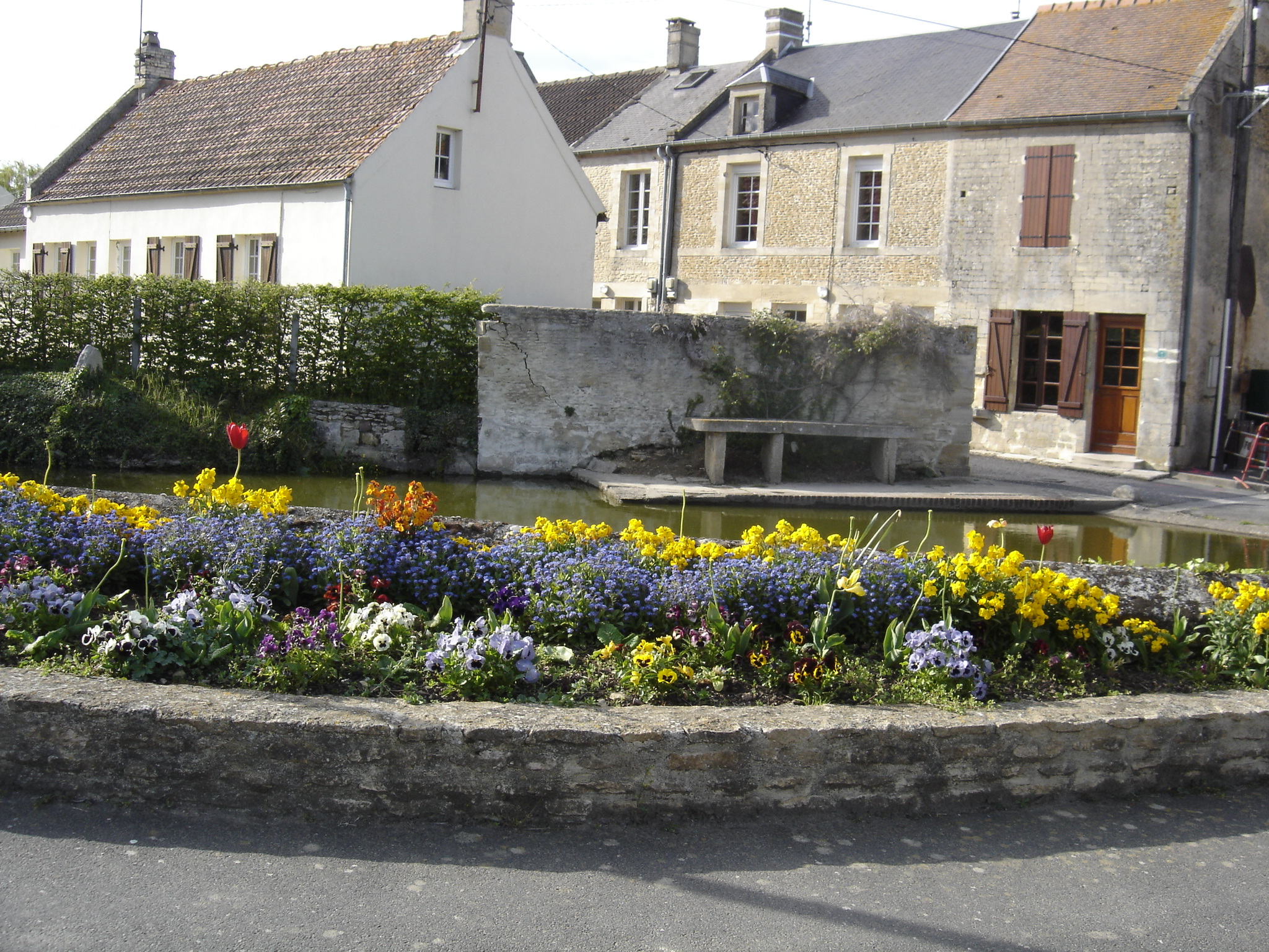 lavoir